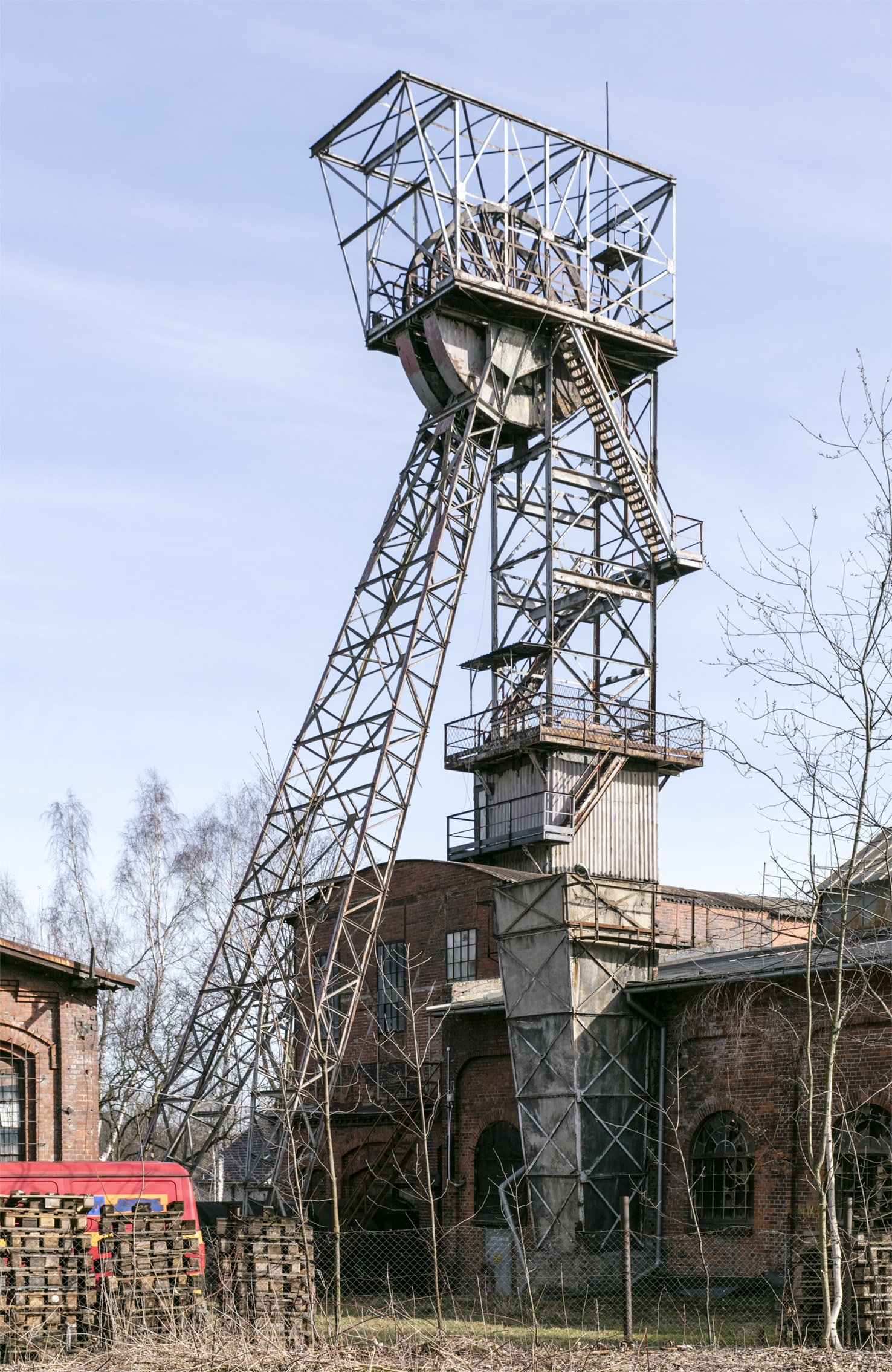 Niederschlesien Bergwerk Victoria Wetterschacht Irina